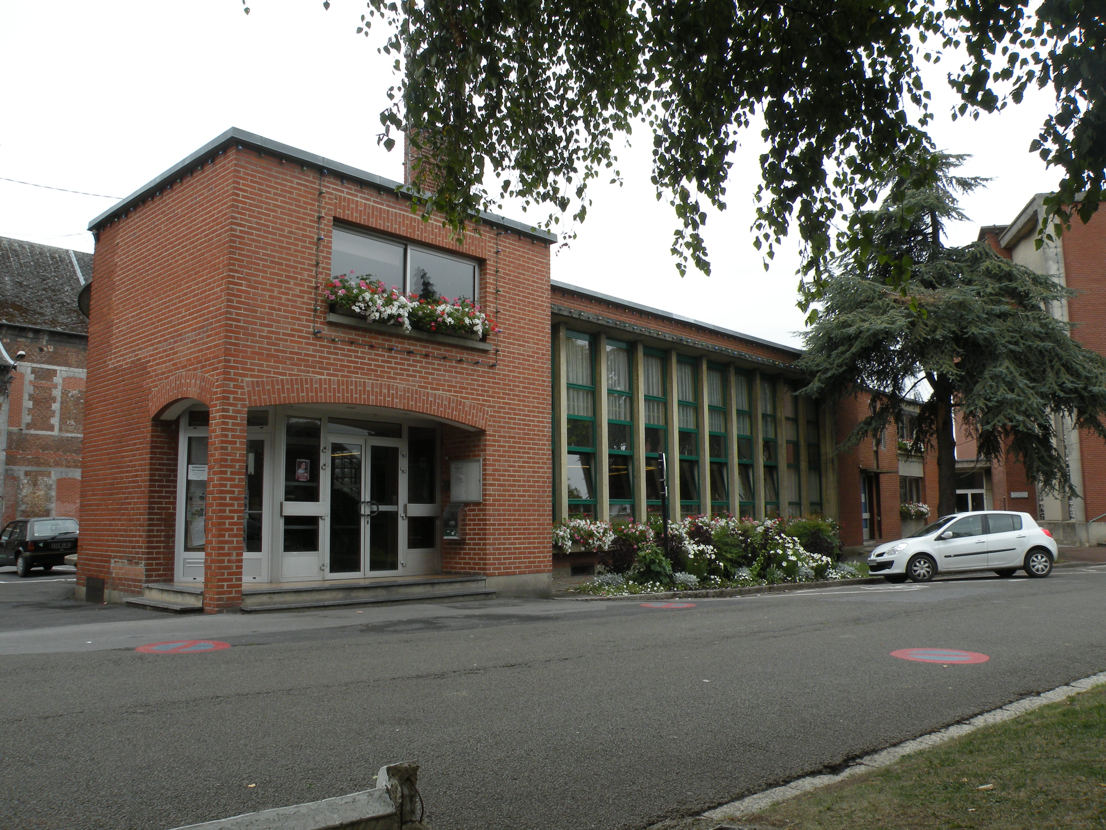 mairie d'Hautmont